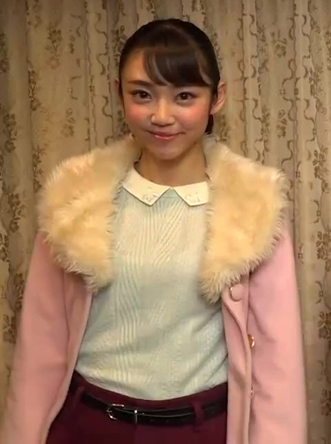 【公式】『帰ってきた手裏剣戦隊ニンニンジャー ニンニンガールズVSボーイズ FINAL WARS』特別映像！